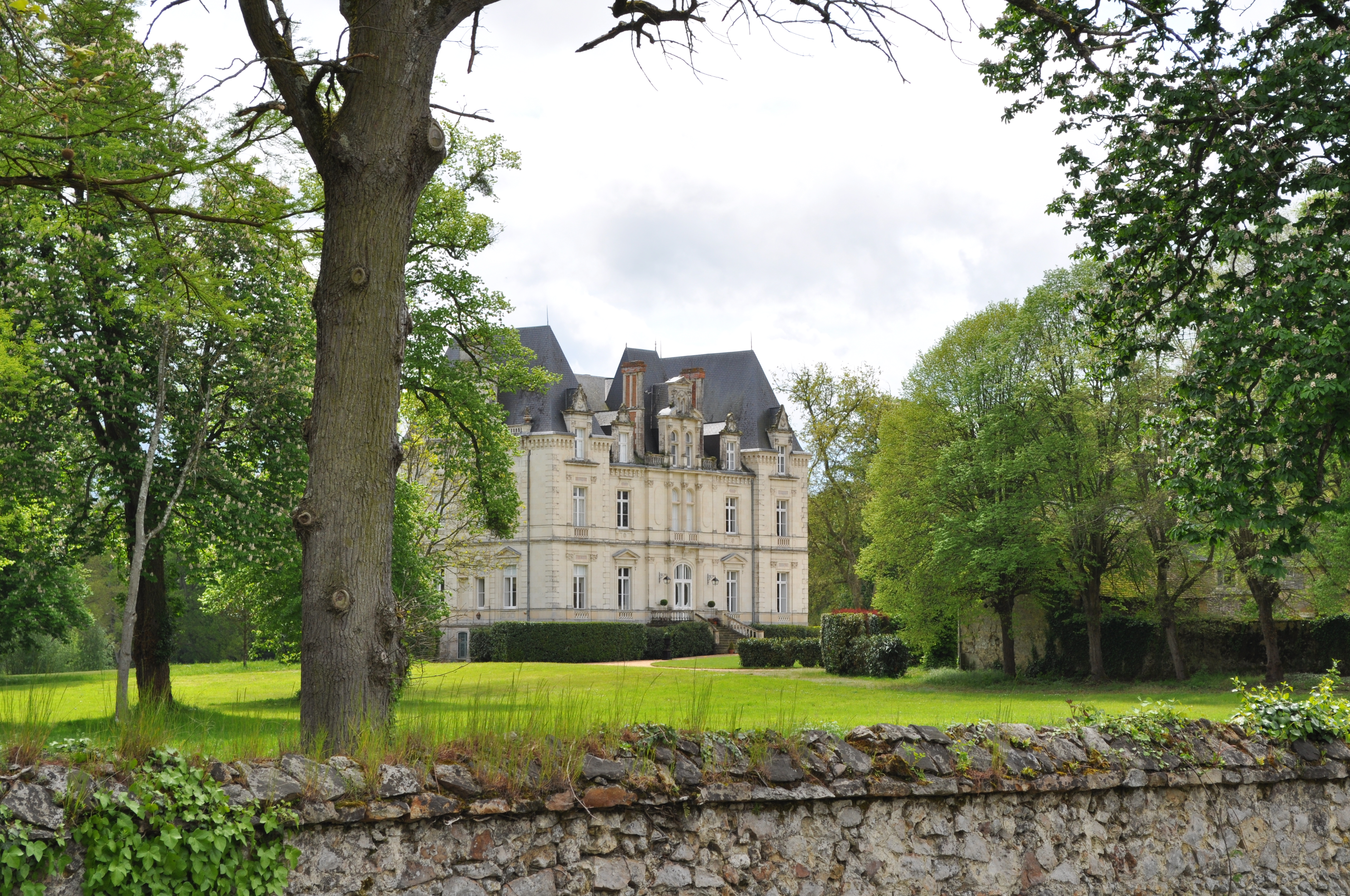 Chateau du Maurier à la Fontaine-Saint-Martin (Sarthe)